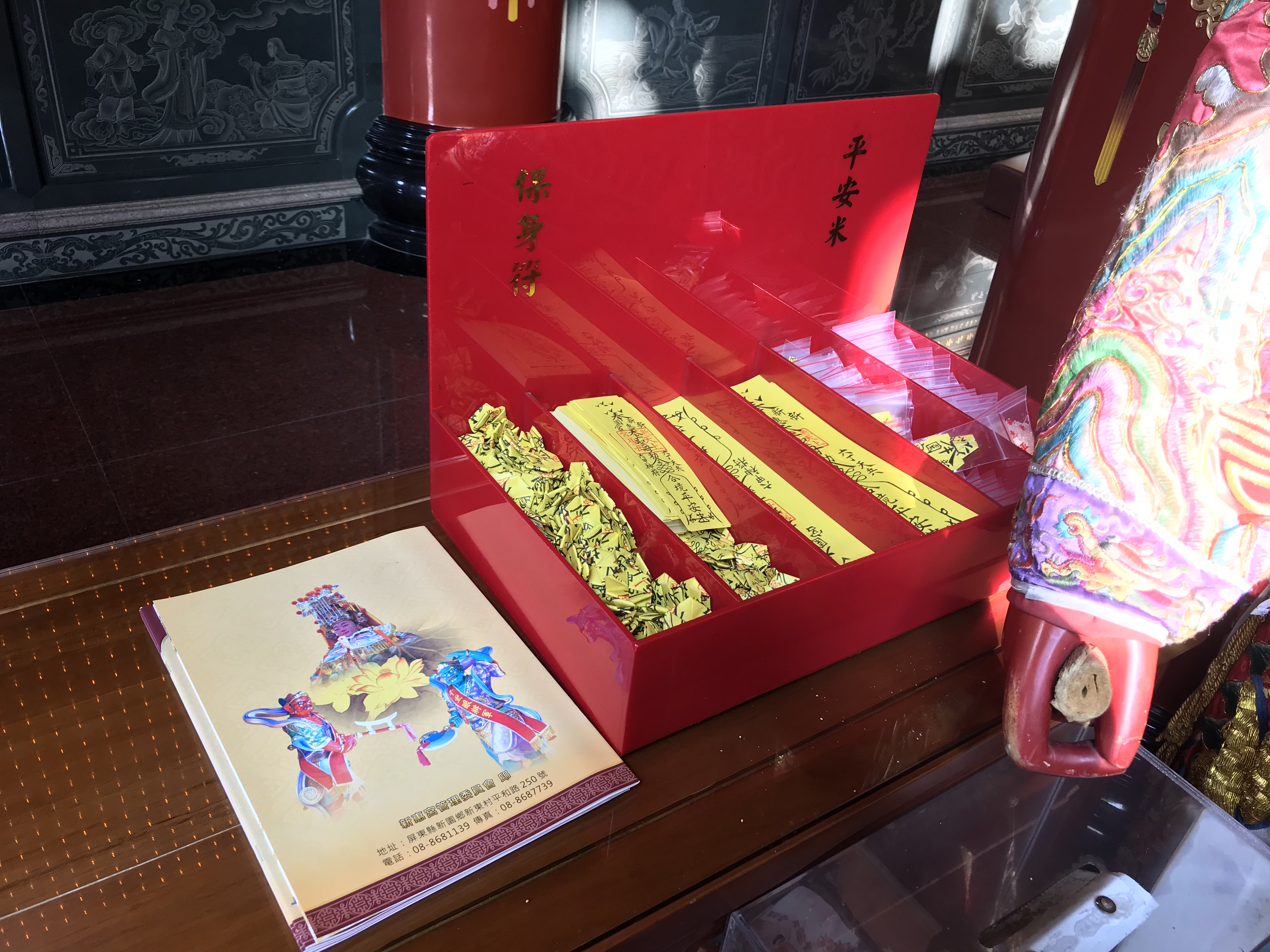 新惠宮農民曆